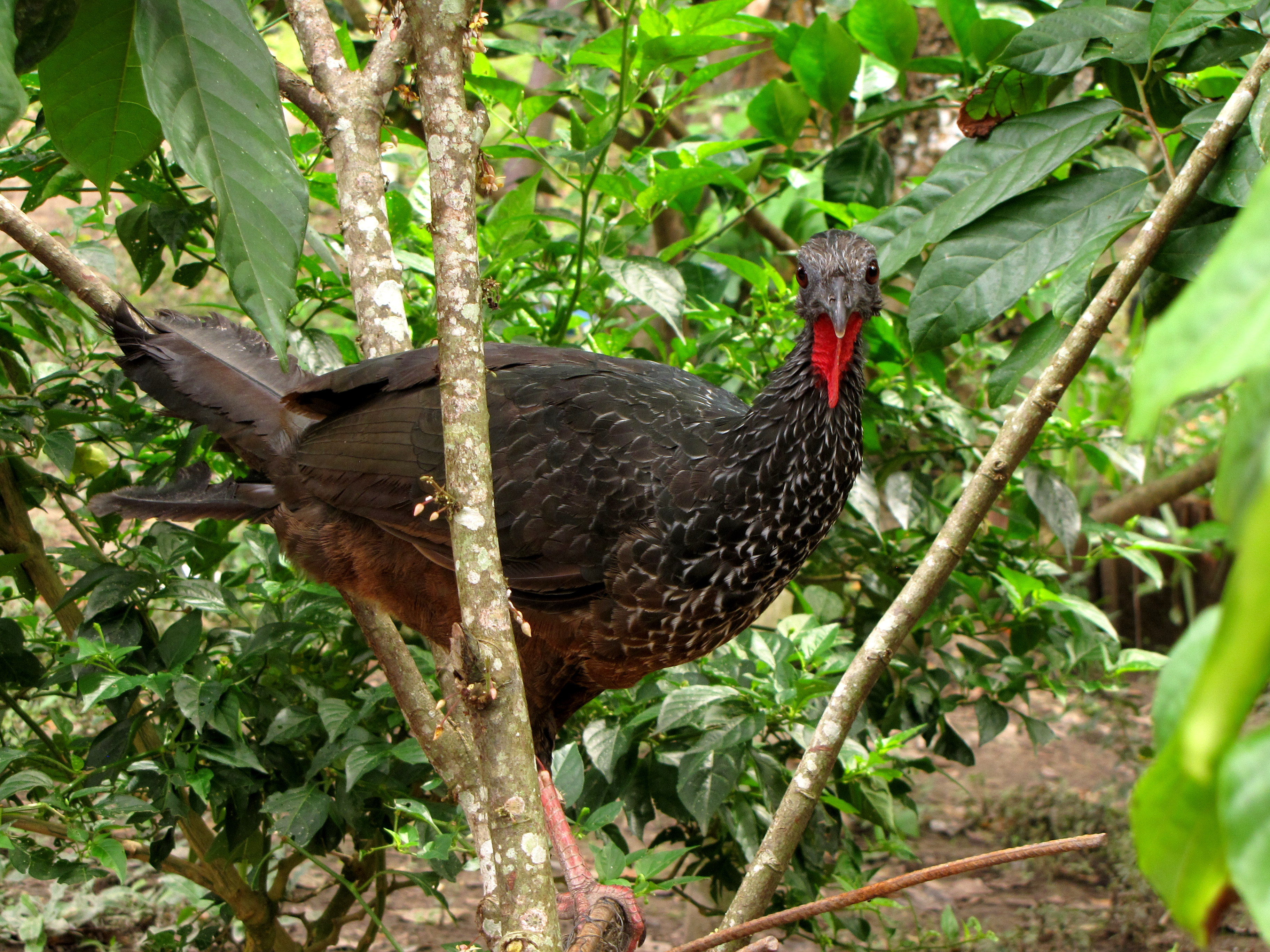 Penelope jacquacu (Pava llanera)